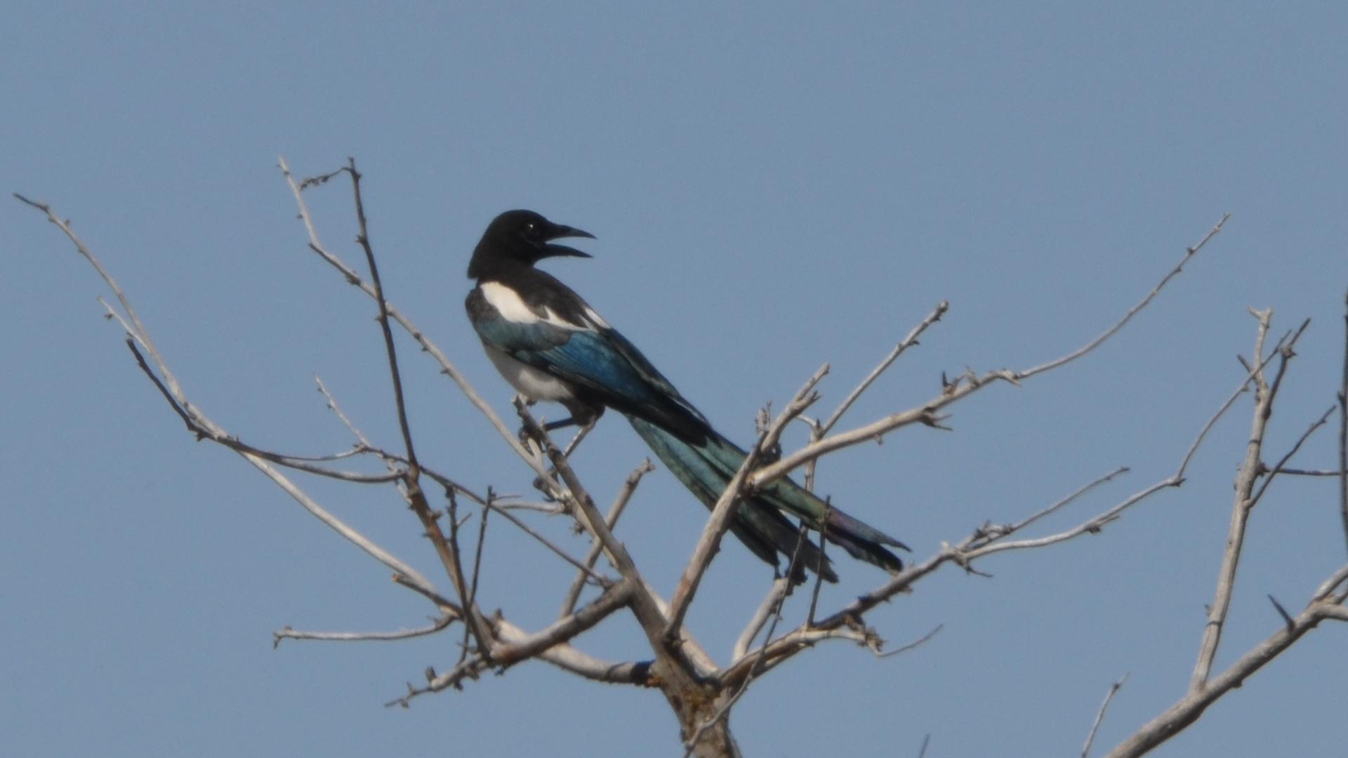 Oregon 2014